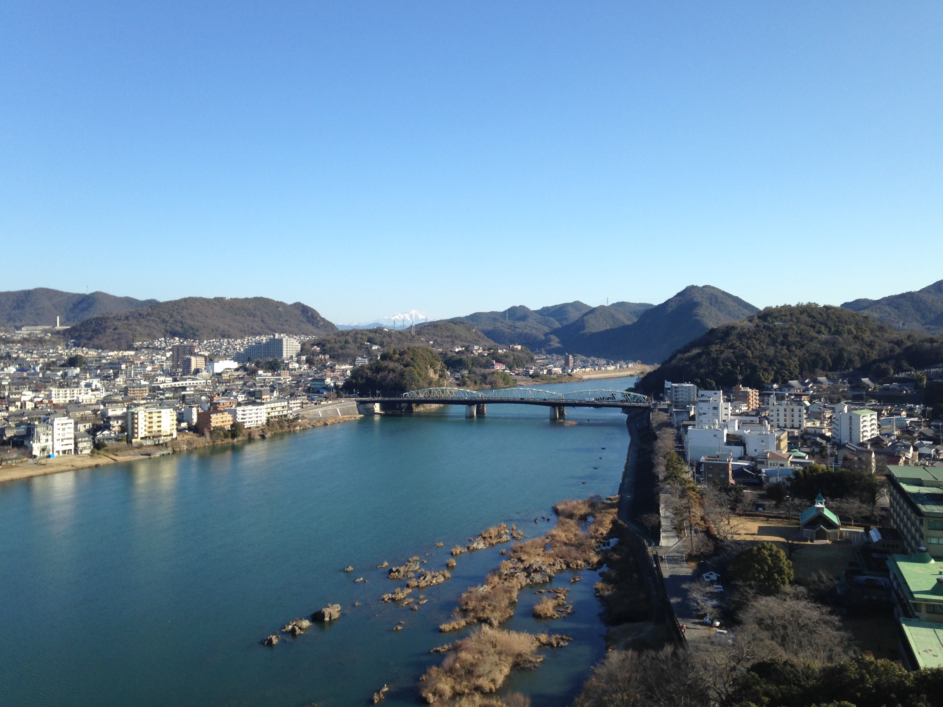 犬山城天守閣より望む犬山橋